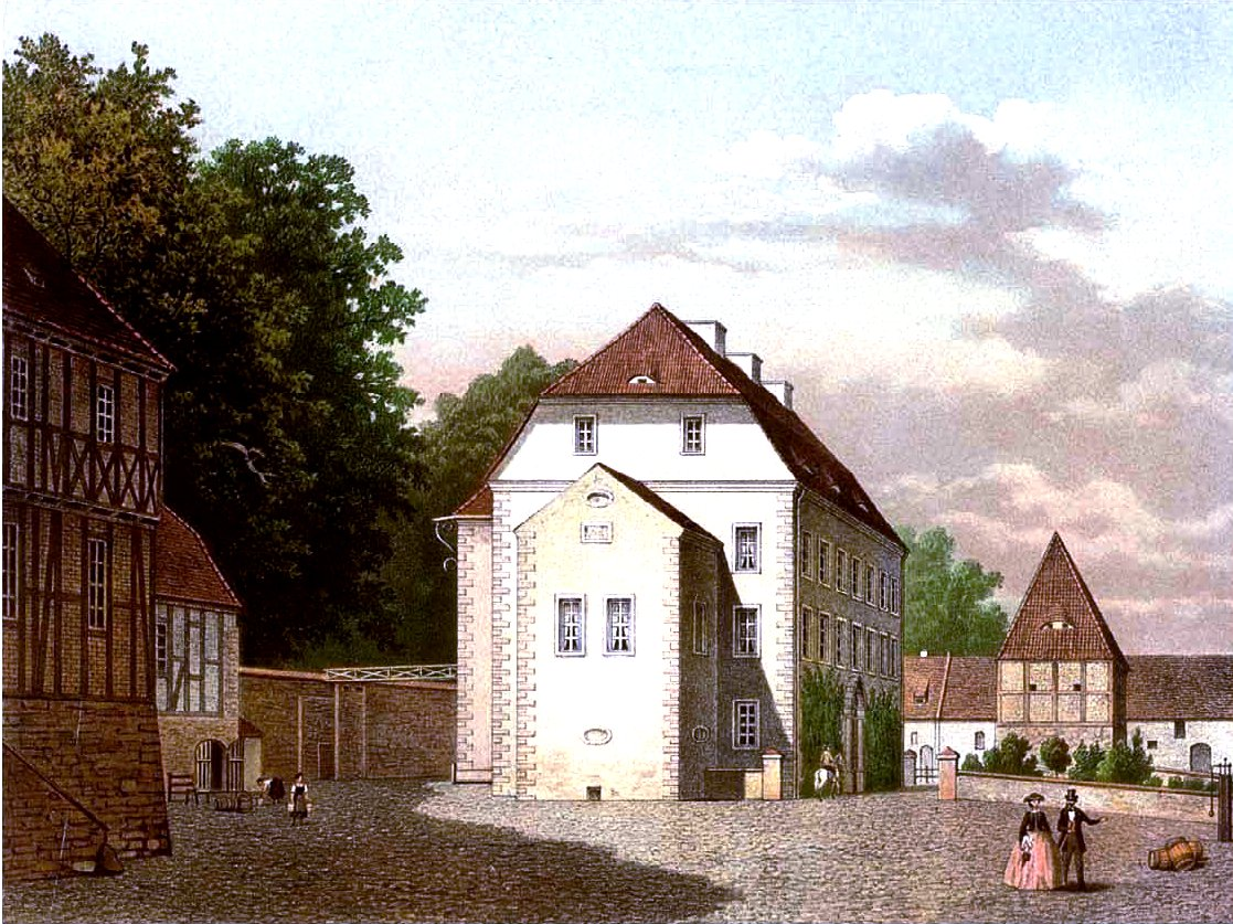 Gut Dönstedt, Kreis Neuhaldensleben, Provinz Sachsen